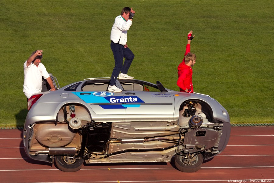 Лада Гранта в ходе выступления группы каскадёров "Тольятти-трюк". На ходу с машины снимают два колеса, достают и багажника запасные и устанавливают их. День города Тольятти 2012